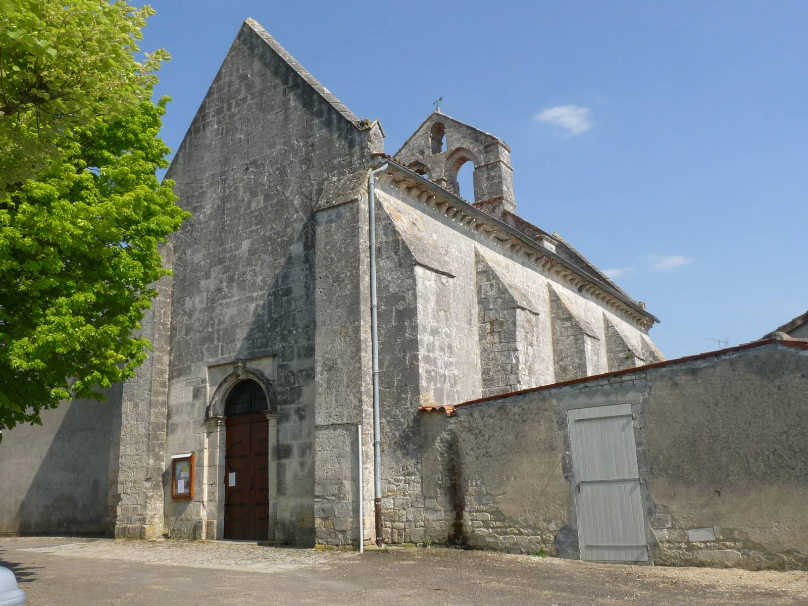 Eglise de Triac, Triac-Lautrait, Charente, France